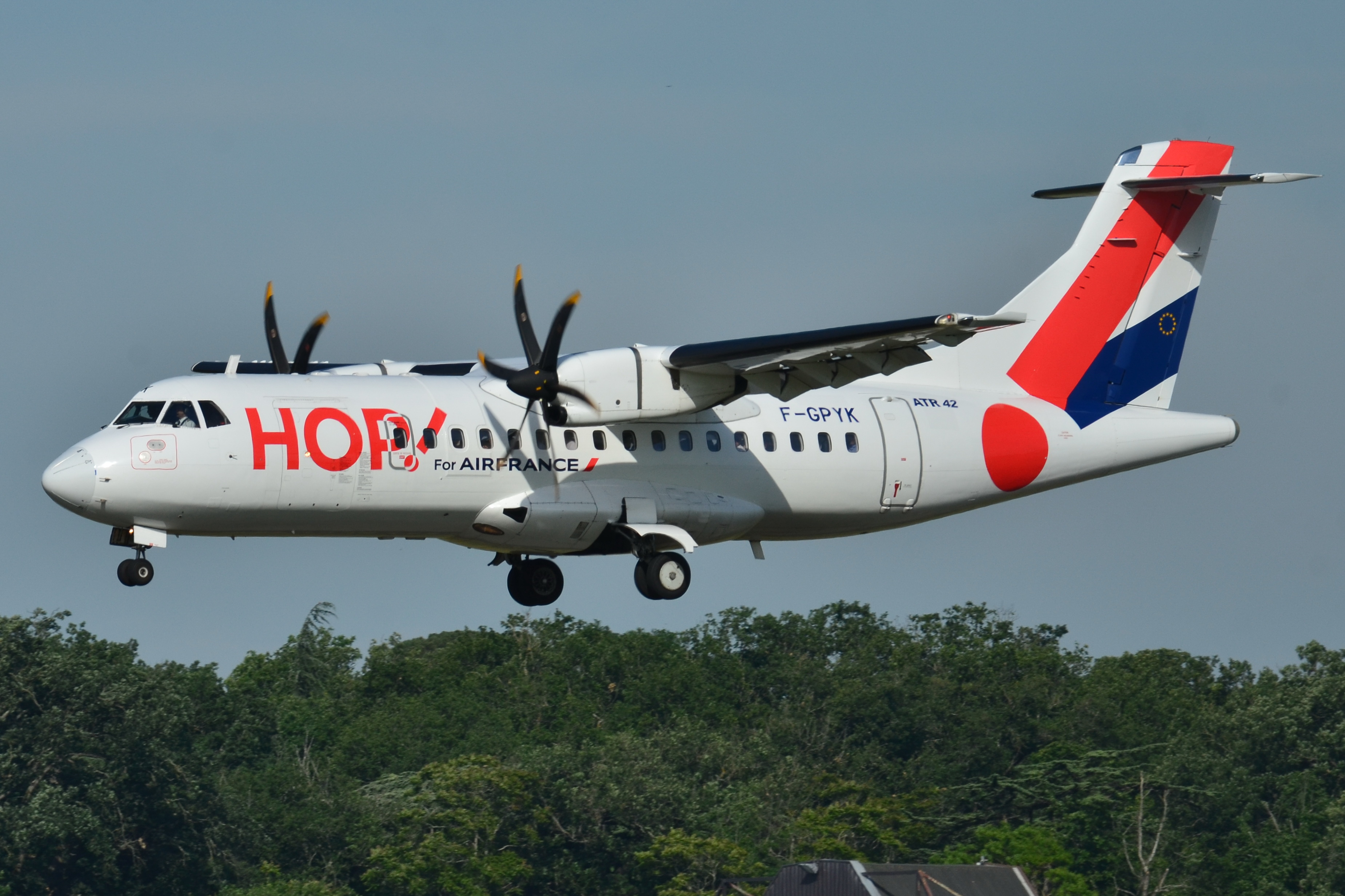 Photo prise à l'aéroport de Toulouse-Blagnac (LFBO) en France. Picture take at Toulouse-Blagnac Airport (LFBO) in France.